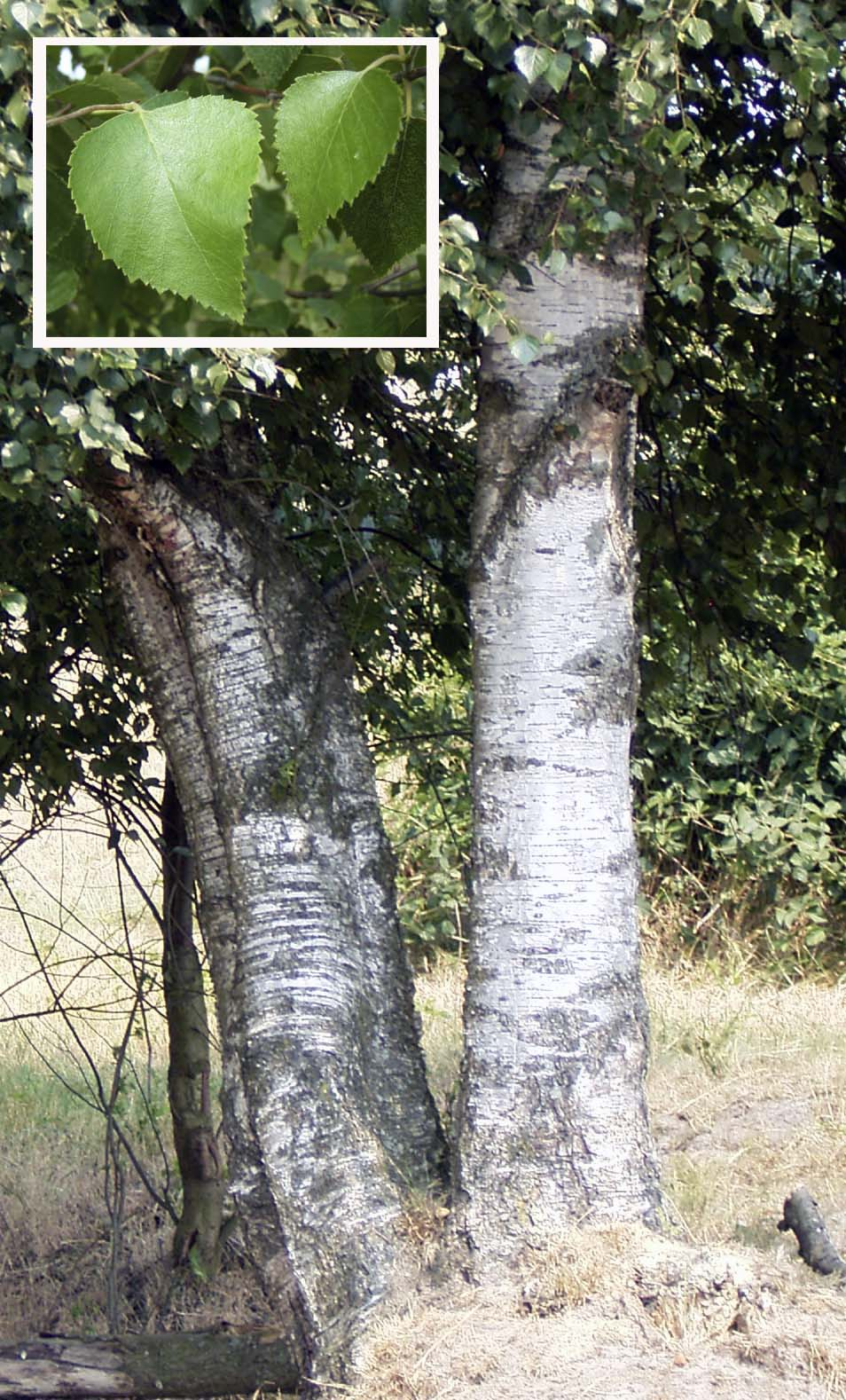 Stämme der Moorbirke (Betula pubescens); links oben junge Blätter